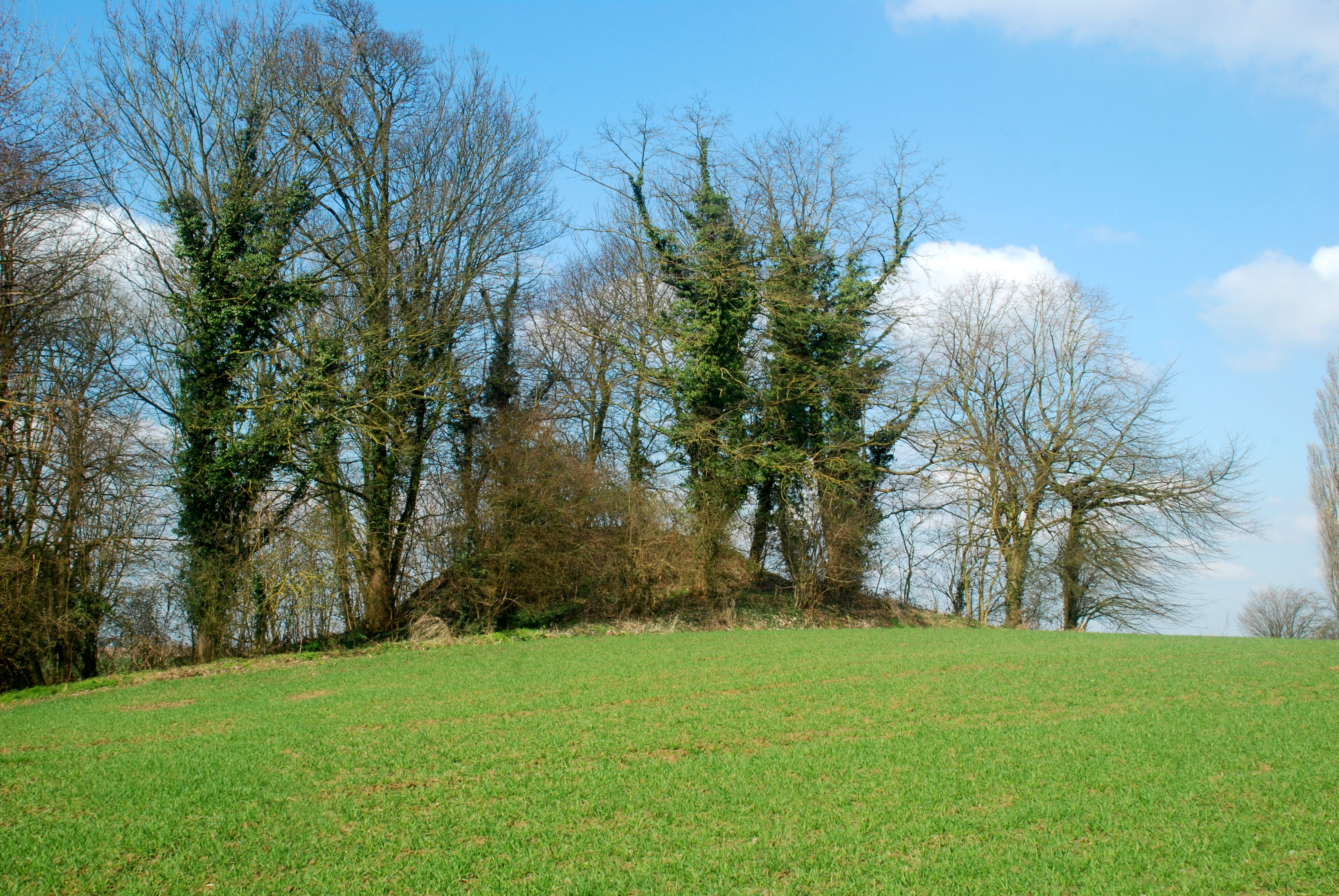 Belgique - Walhain - Tourinnes-Saint-Lambert - Tumuli de Libersart